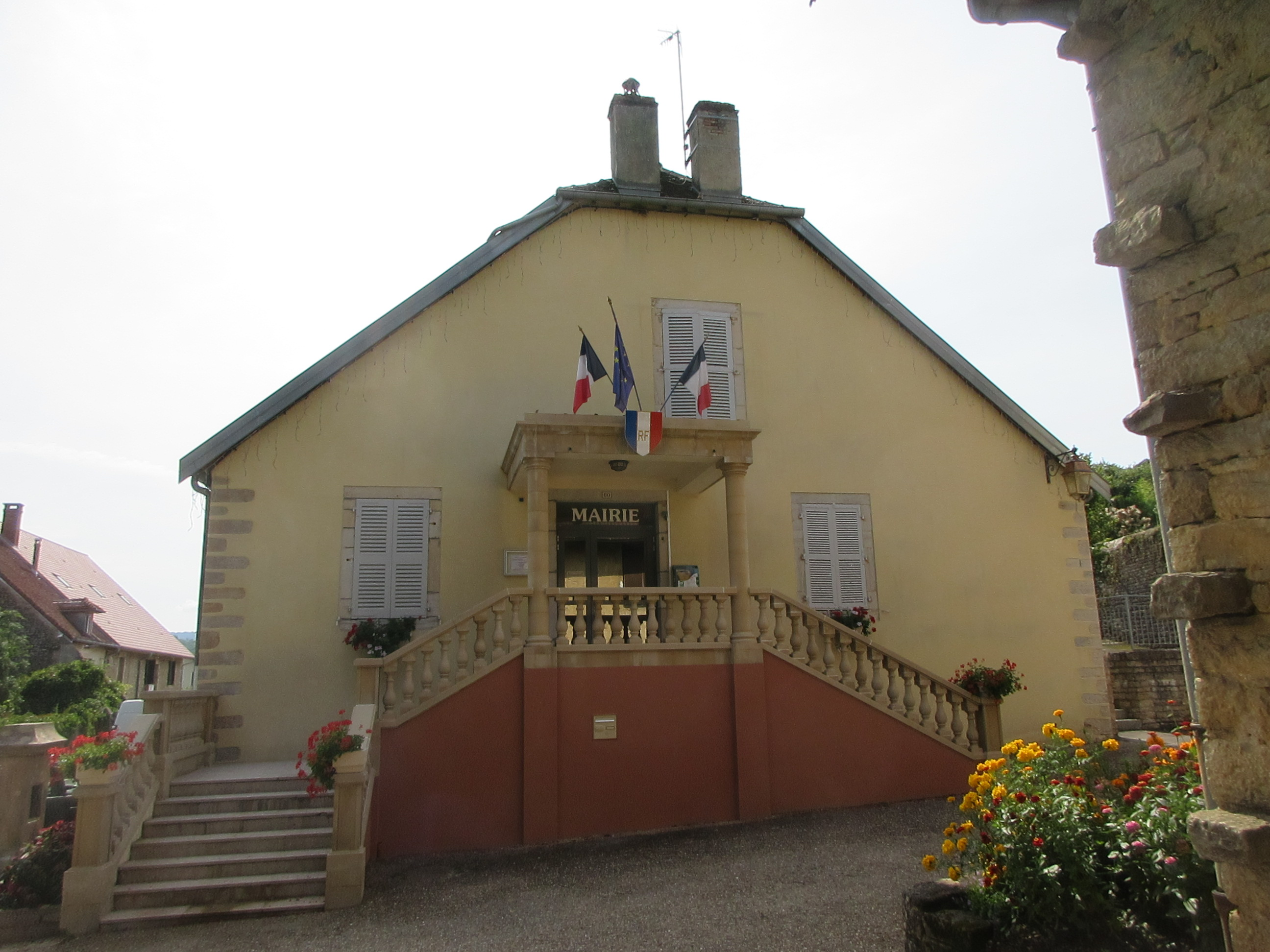 Mairie de Courbouzon, Jura.